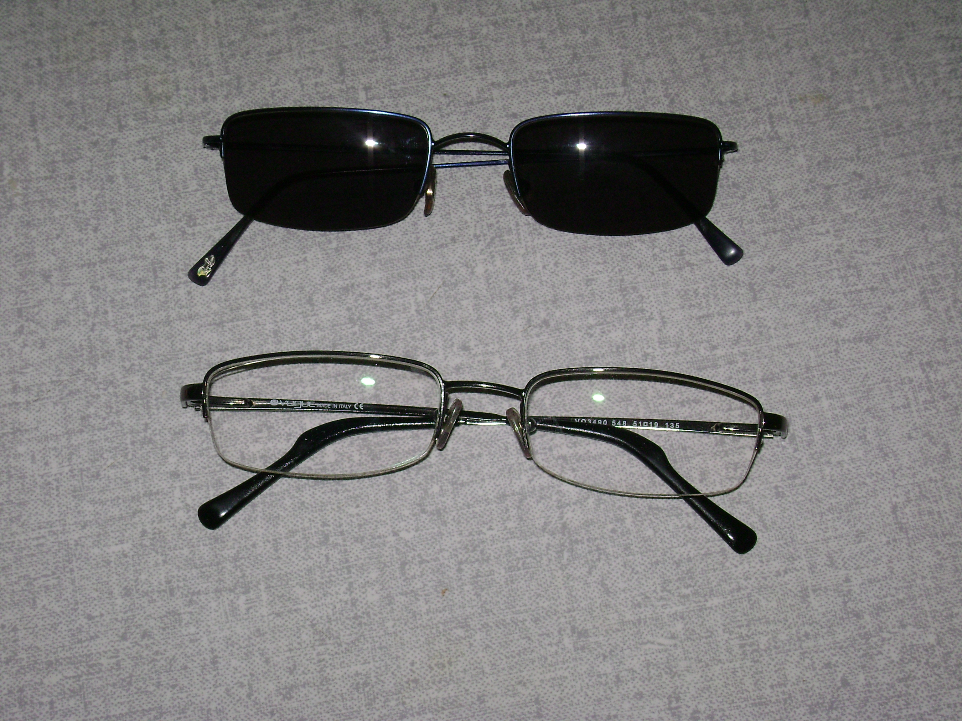 Dioptrijske naočale s zatamnjenim i normalnim lećama